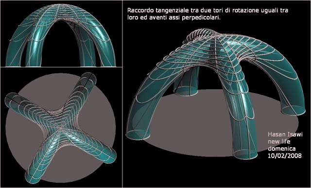 raccordo tangenziale tra due tori di rotazione uguali tra loro ed aventi assi perpedicolari